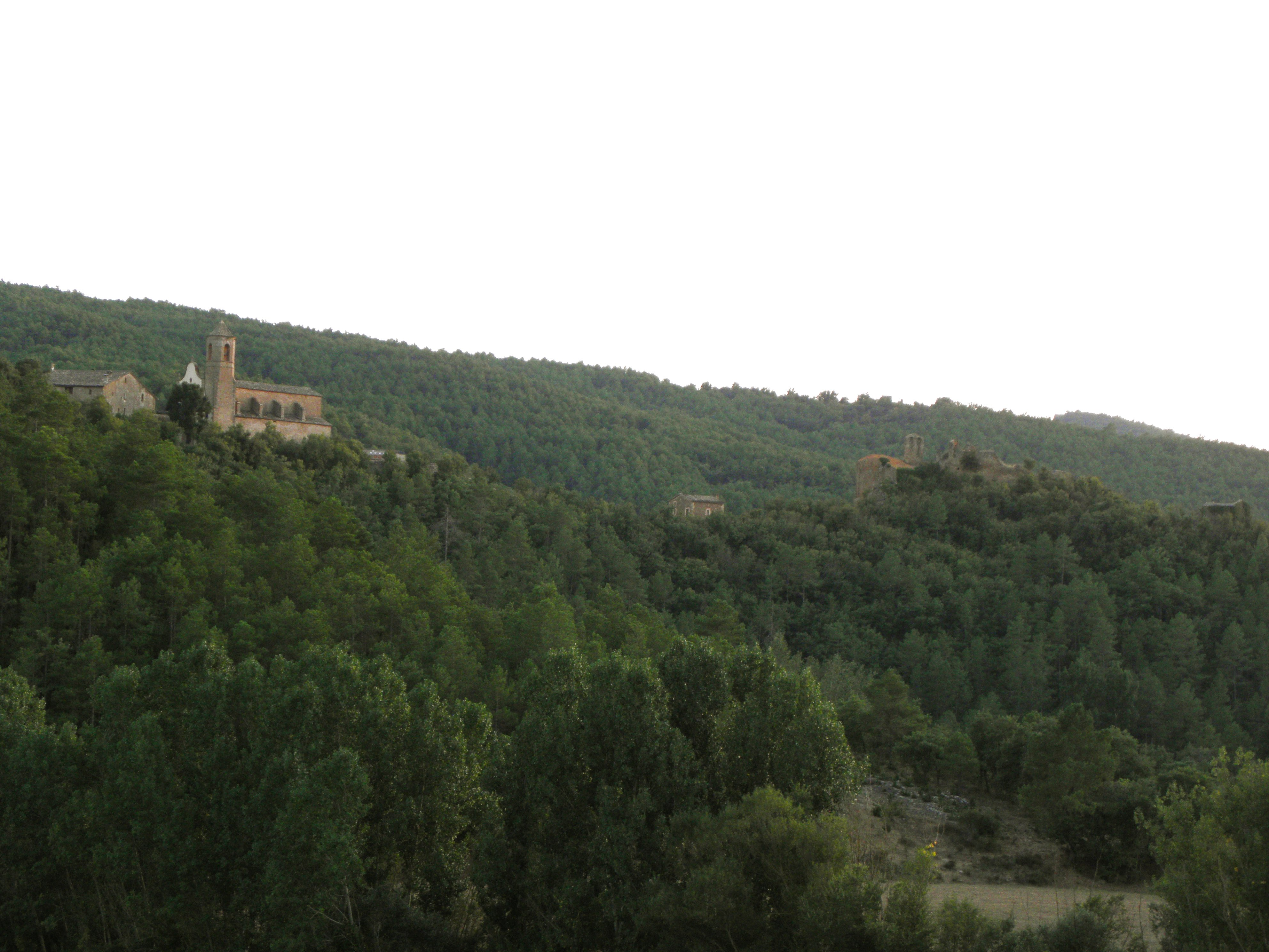 El nucli de Madrona (municipi de Pinell de Solsonès), vist del la masia de l'Estany, (banda del NE)